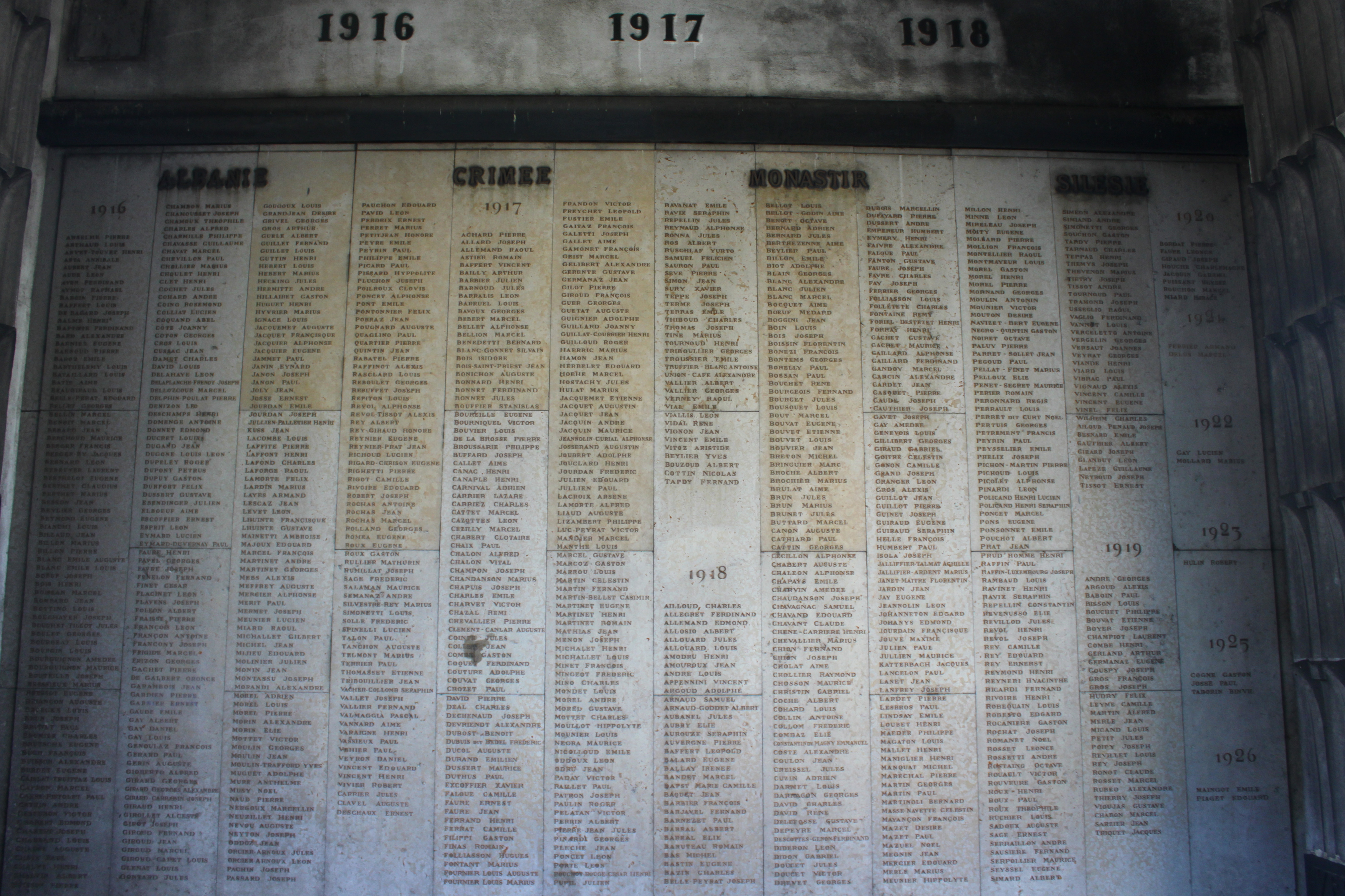 Monument aux morts présent dans la Porte de France de Grenoble.